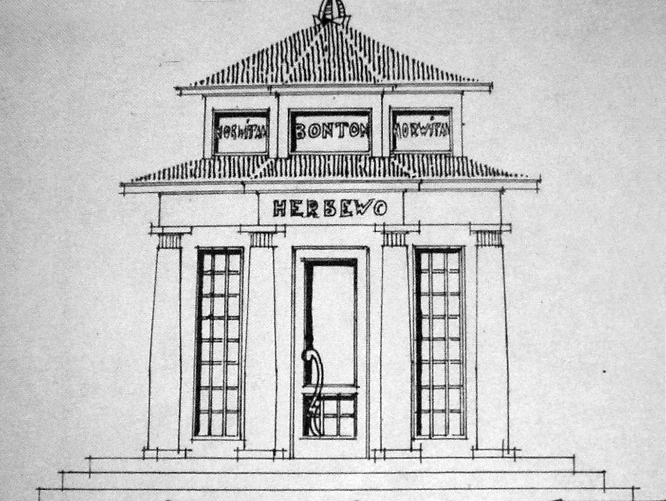 Проект кіоску «Hebrewo» на Східних торгах у Львові. Архітектор Ян Новорита.